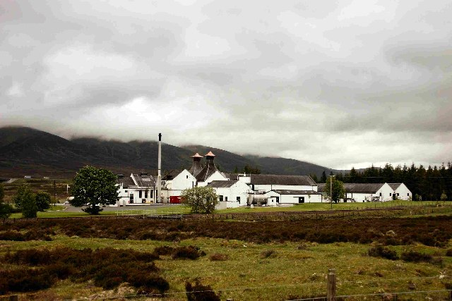 Dalwhinnie Distillery